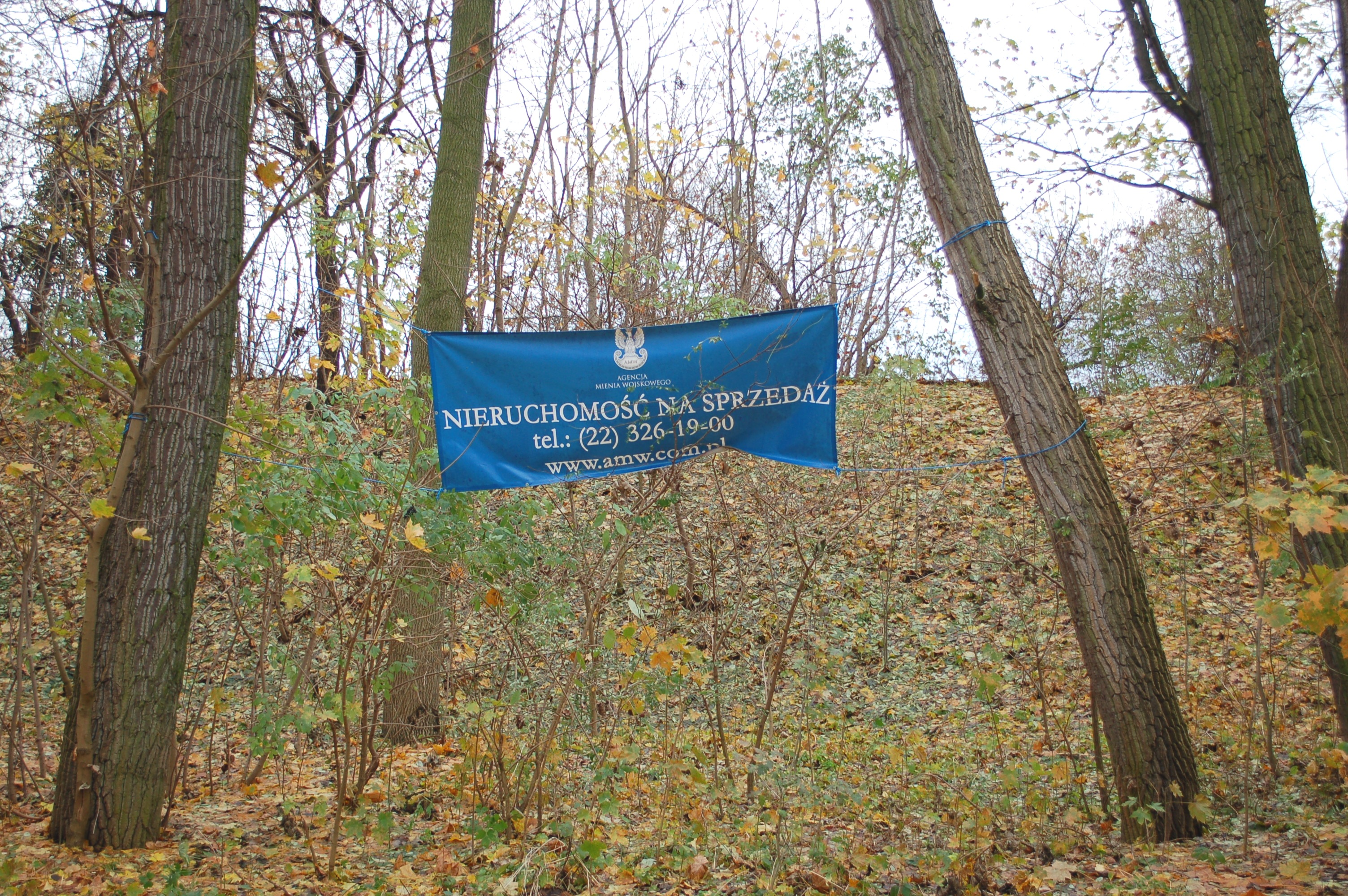 Powder Magazine Zegrze